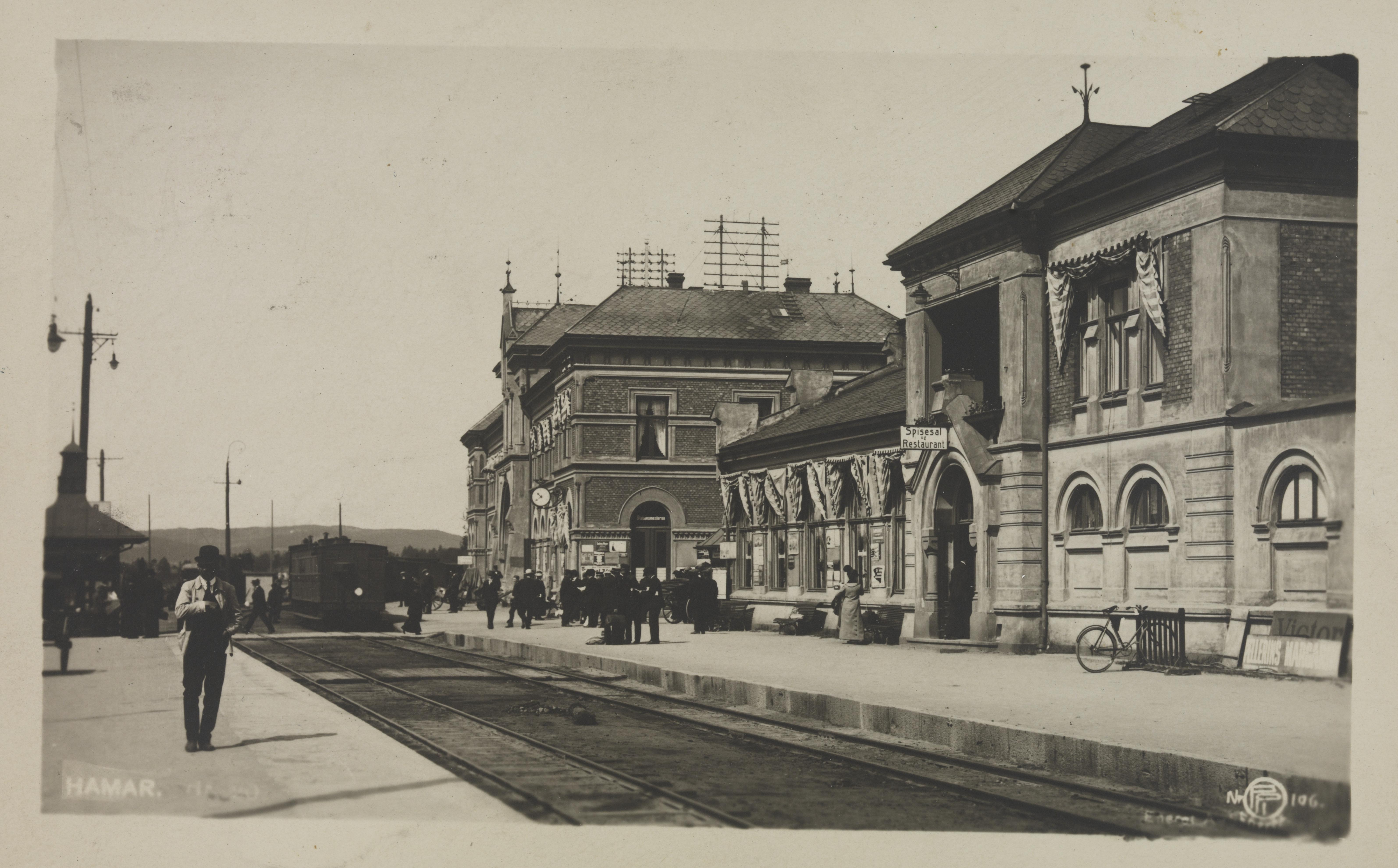 Bildet er hentet fra Nasjonalbibliotekets bildesamling Hamar stasjon, Hamar, Hedmark